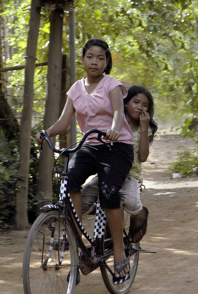 Cambodian girls on a bicycle.